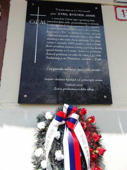 Pamätná tabuľa väznenému františkánovi C. B. Janíkovi v Liptovskej Tepličke